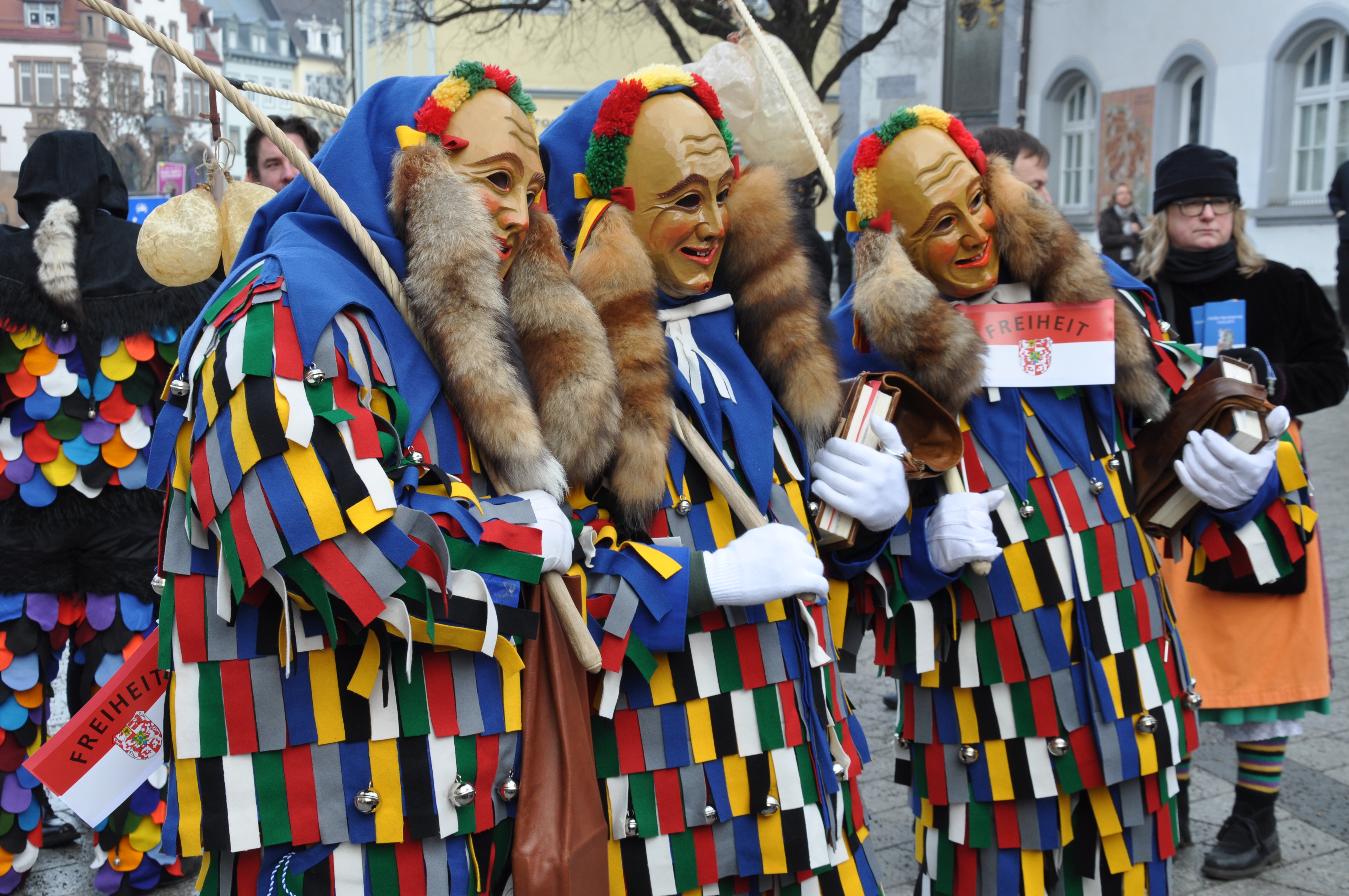 Ravensburg, Narrenverbrüderung der Ravensburger Narren (Schwarze Veri Zunft, Milka) und der Weingartner Narren (Plätzlerzunft, Mostclub) am Fasnetsamstag vor dem Rathaus auf dem Marienplatz Drei Butzhansel der Schwarze Veri Zunft Ravensburg